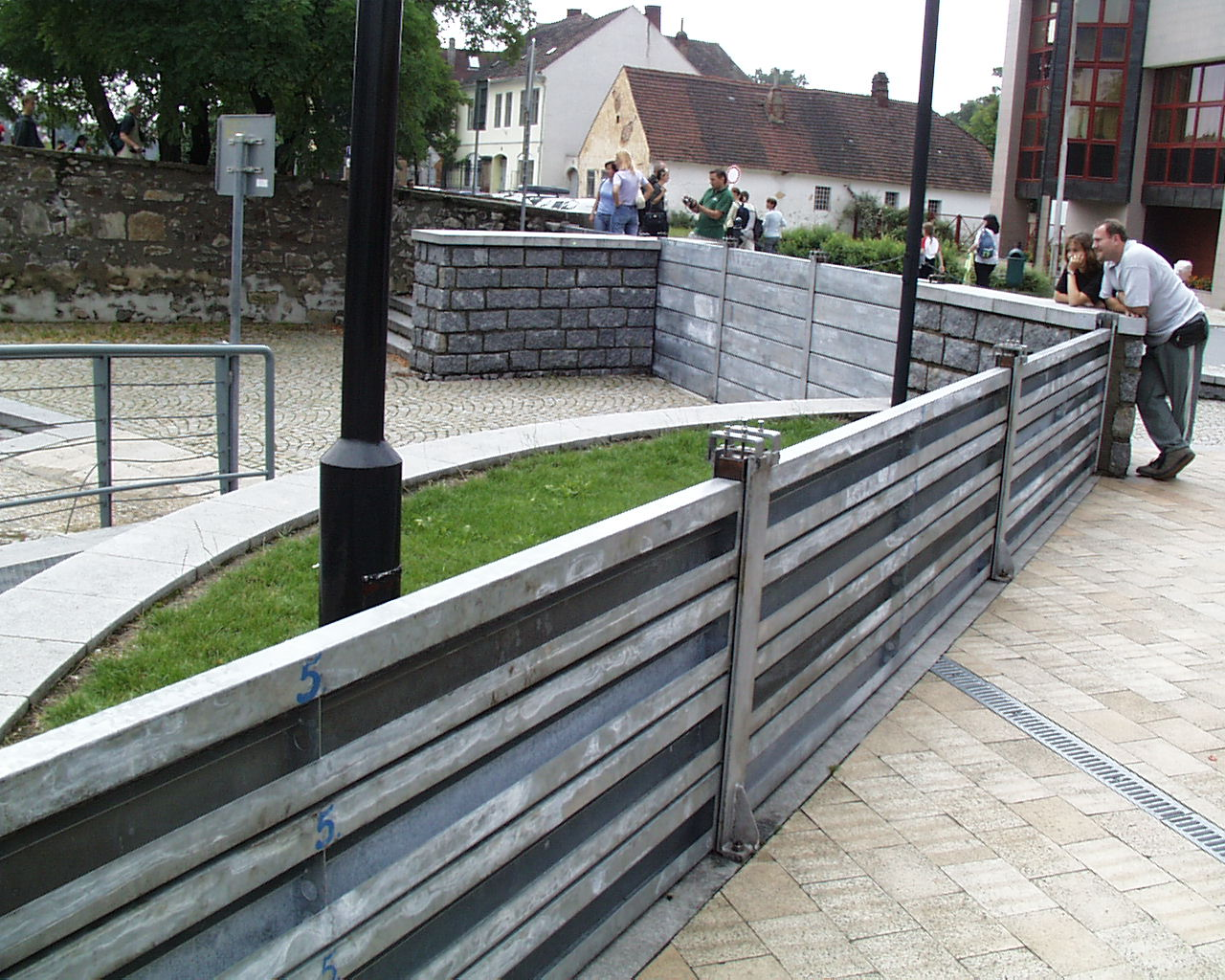 Detail povodňové hráze (Pisek 2002)